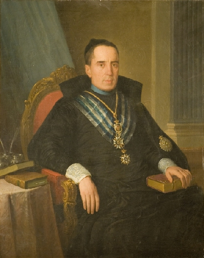 Retrato del eclesiástico, político, jurista y escritor Manuel López Cepero (1778-1858), que destacó por ser un gran coleccionista de arte y llegó a ser deán de la catedral de Sevilla.